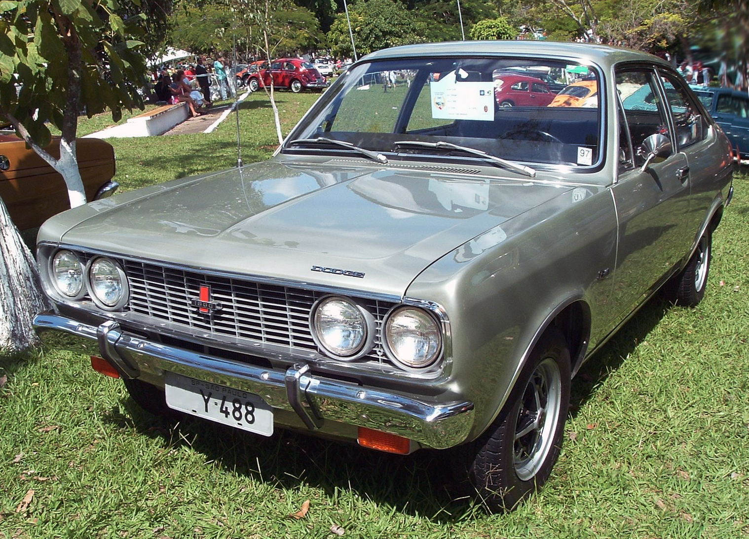 Brazilian-built Dodge 1800, on Hillman Avenger-basis